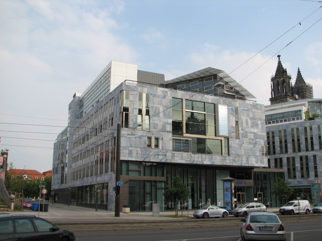 Nord/LB-Sitz am Breiten Weg in Magdeburg